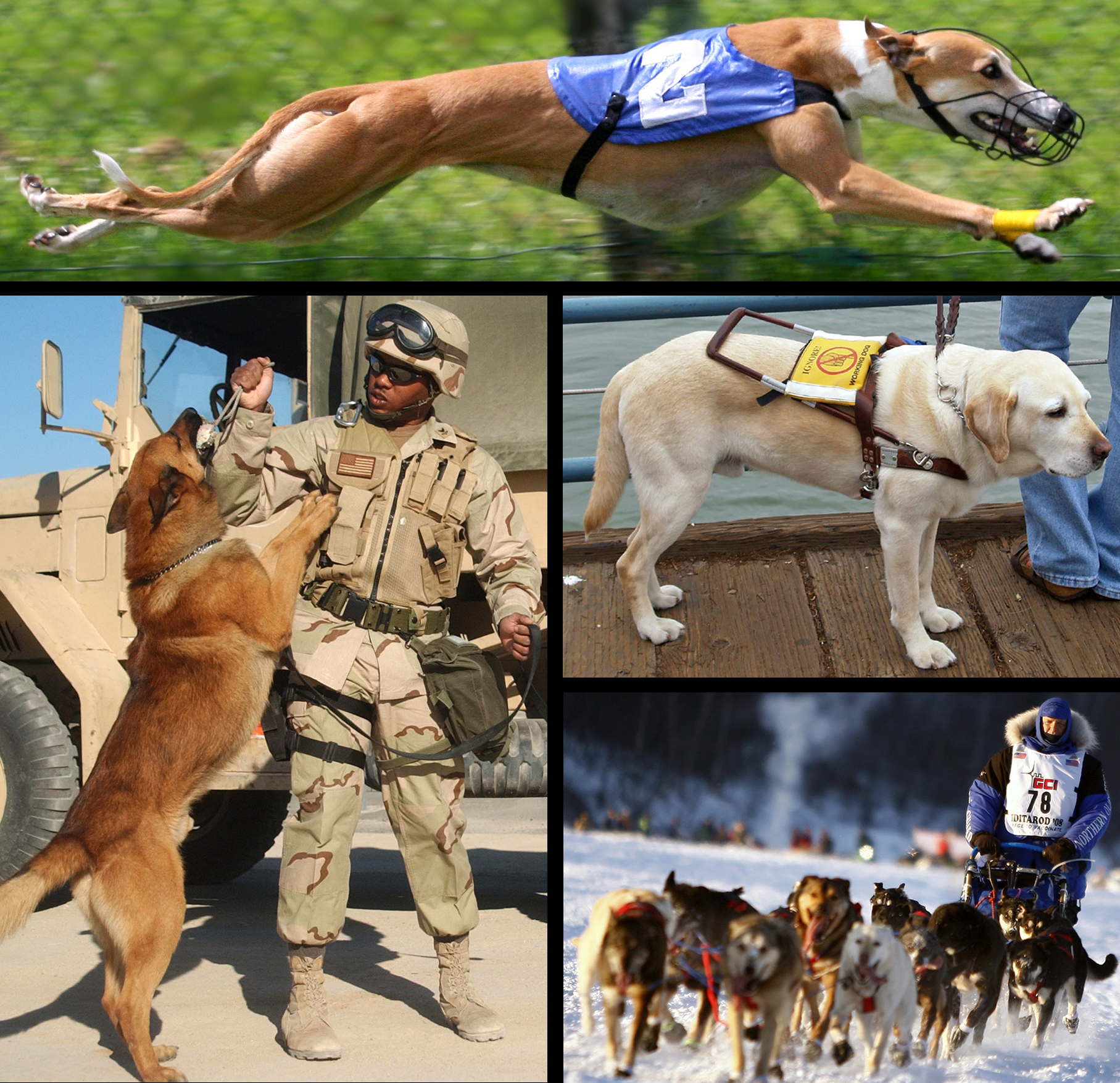 assemblage illustratif de l'article wikipedia "chiens"